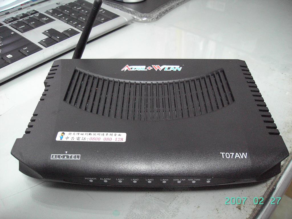 中華電信ADSL2+數據機T07AW。